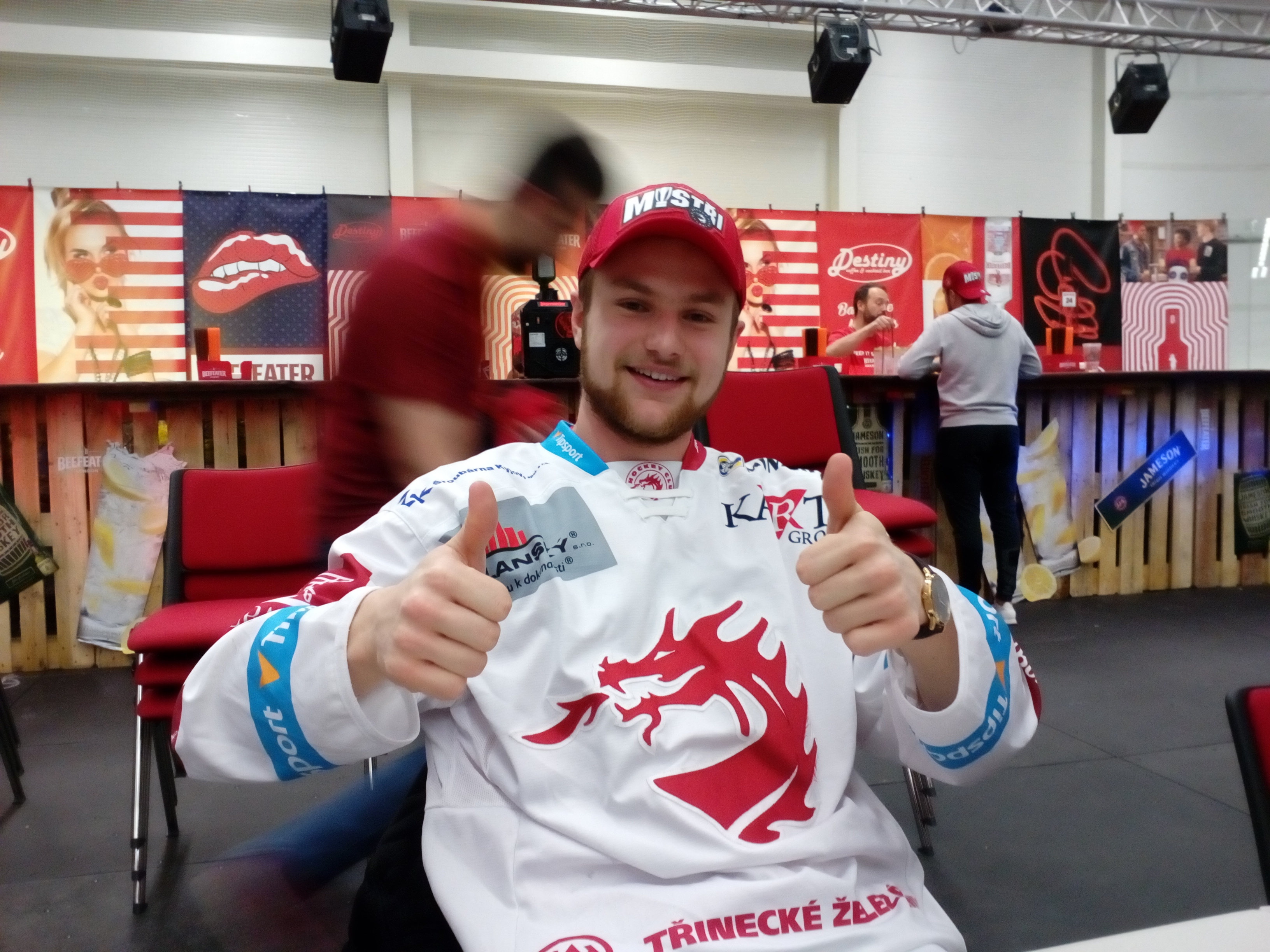 Po zakončení sezóny 2018/19 na autogramiádě v malé (tréningové) Werk Areně